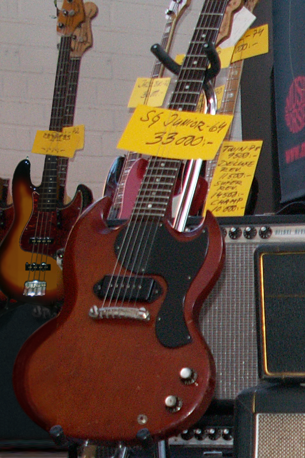 1964 Gibson SG Junior Fuzz Guitar Show 2008